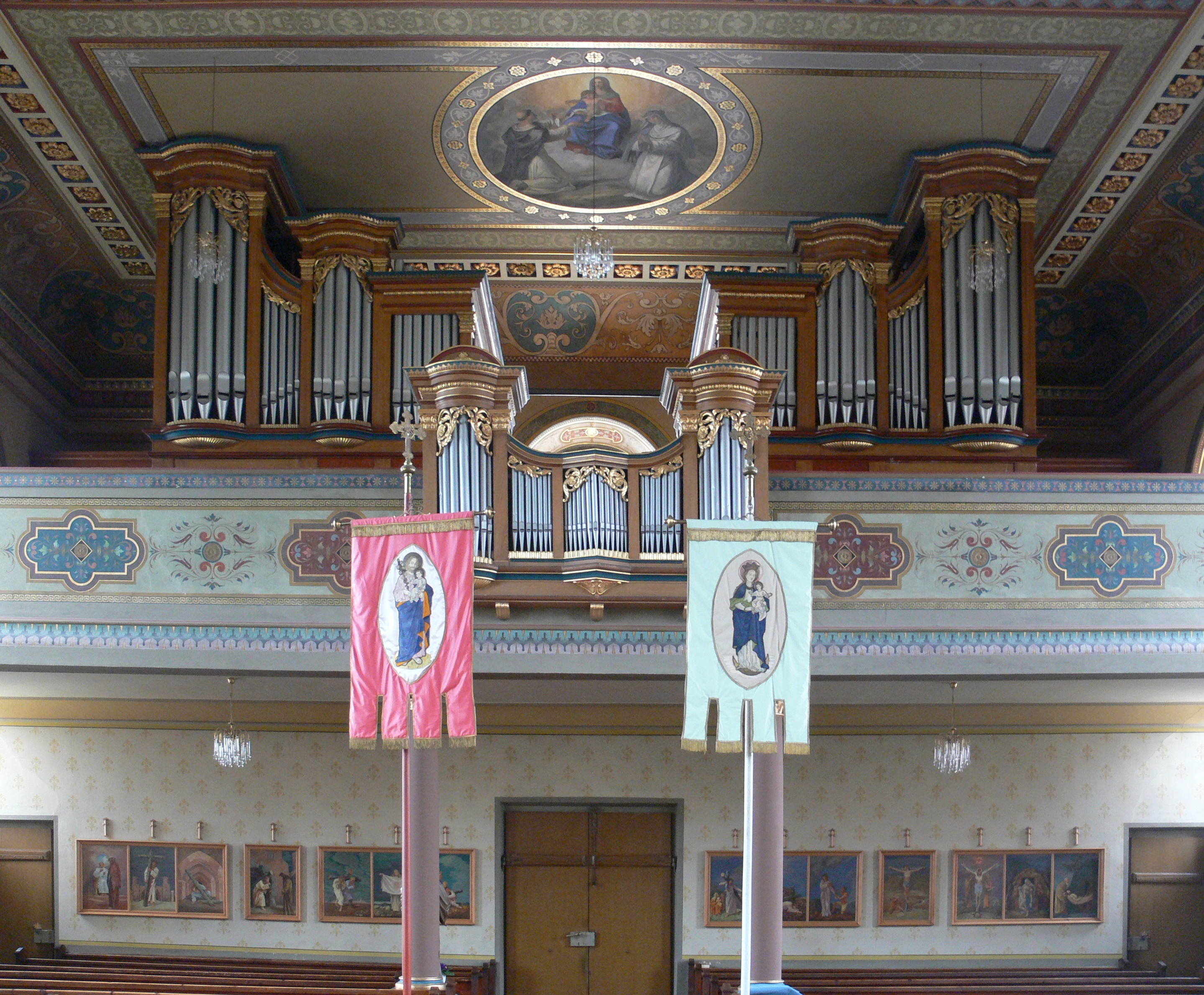 Kath. Pfarrkirche St. Johannes Baptista, Wuchzenhofen, Stadt Leutkirch im Allgäu